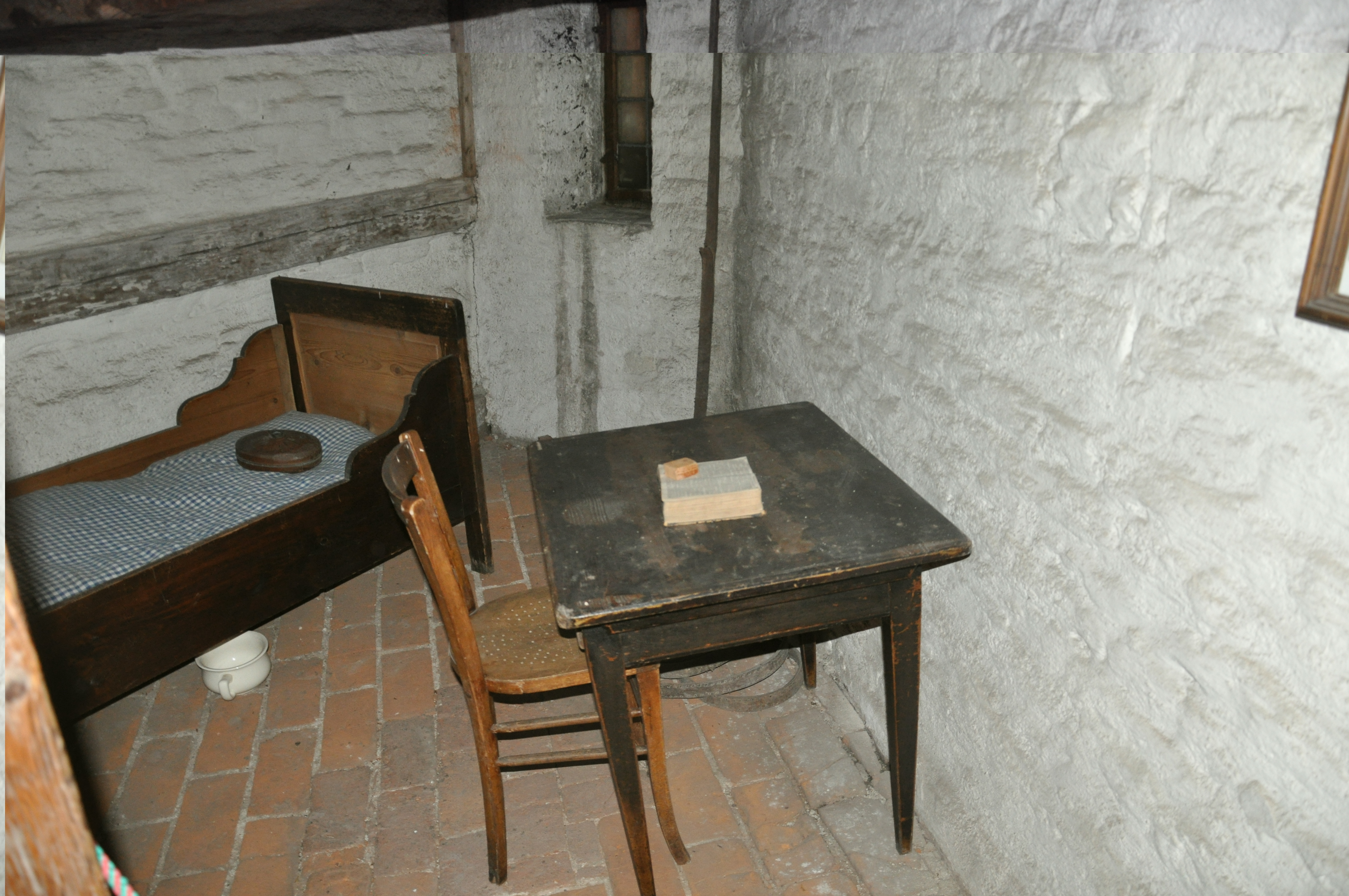 Memmingen, St. Martin, rekonstruiertes Tümerzimmer